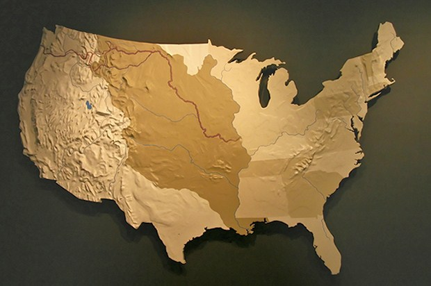 La Louisiane 1803